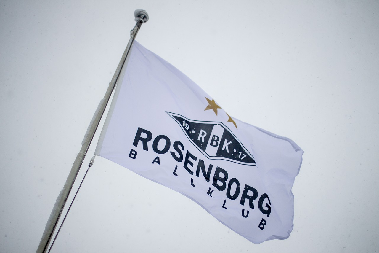 Trondheim